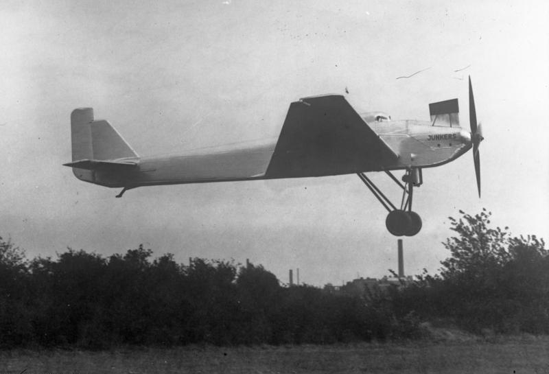 Mit diesem Stratosphärenflugzeug soll eine Höhe von 18.000 m erreicht werden ! Das erste neue Junkers-Stratosphären-Flugzeug "Ju. 49" hat seinen ersten erfolgreichen Probeflug beendet. Aufnahme während des Startes.